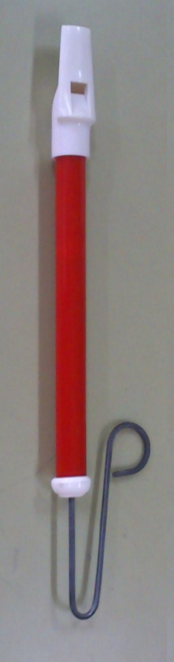 Flauta de émbolo